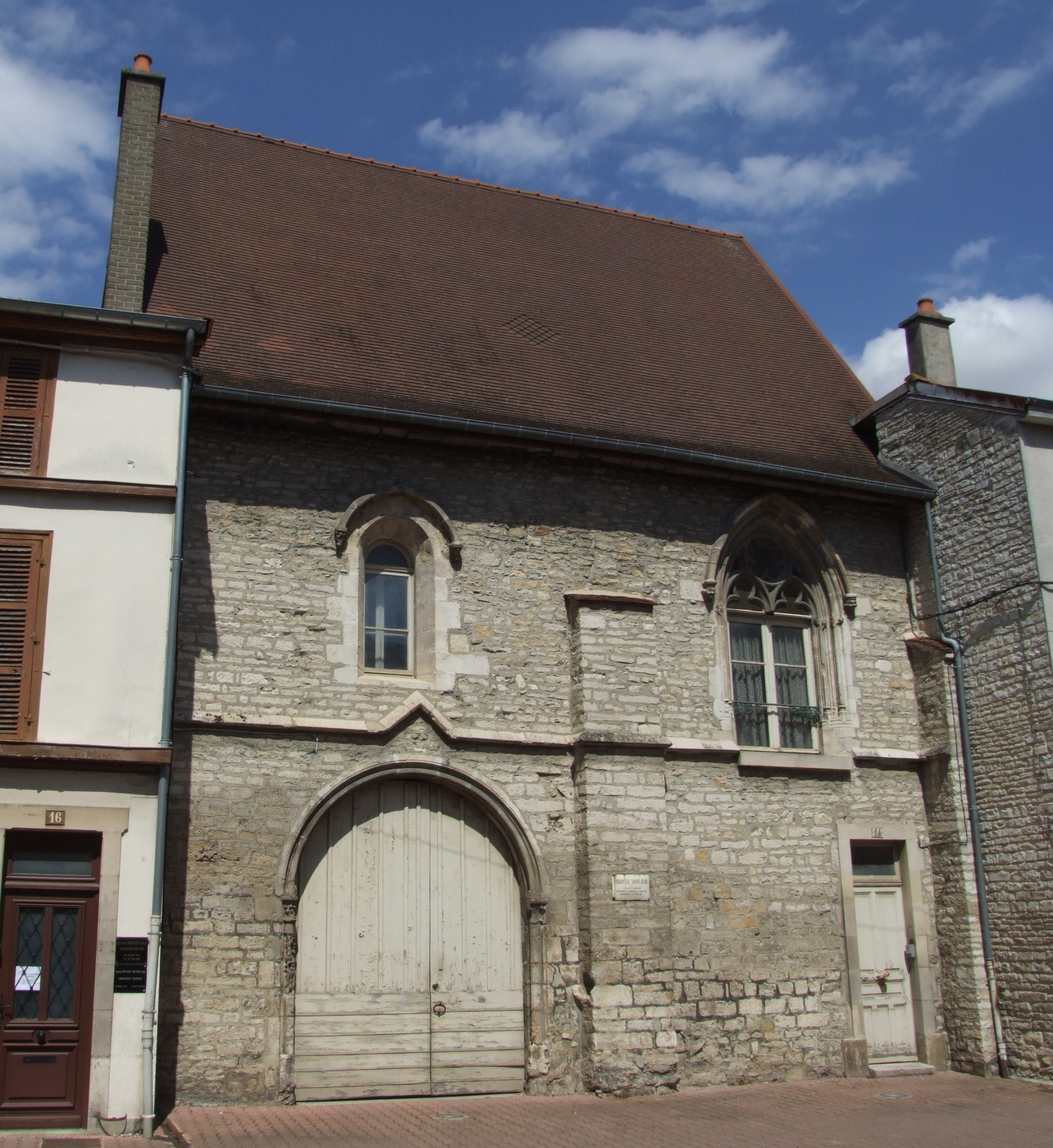 Chapelle templière Saint-Jean, Bar-sur-Aube, Aube, Champagne-Ardennes, FRANCE